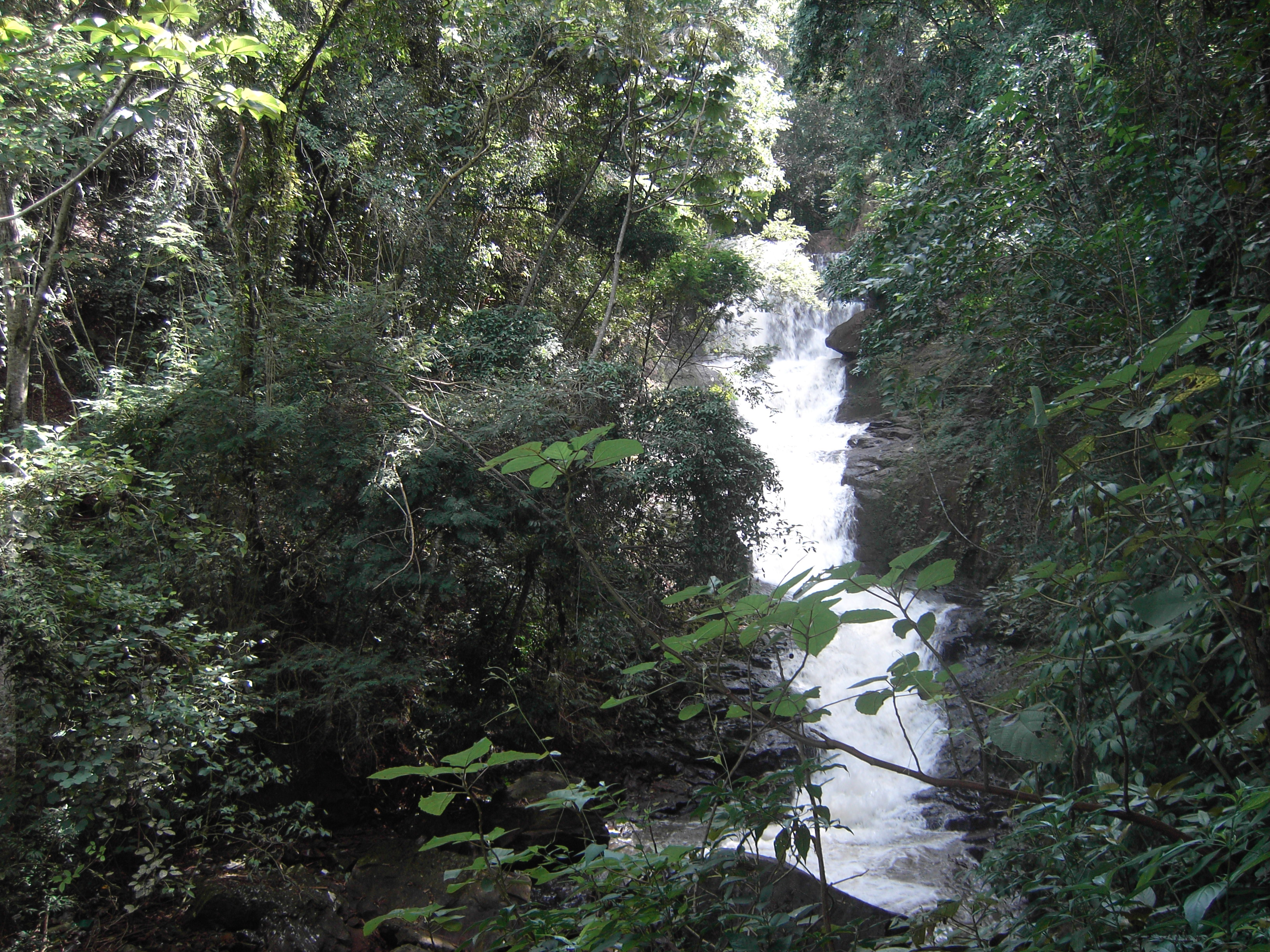 Template:Cachoeira no Parque Arthur Tomas, Londrina-PR, Brasil